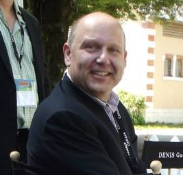 Chris Meledandri au Festival International du Film d'Animation d'Annecy le 12 juin 2013